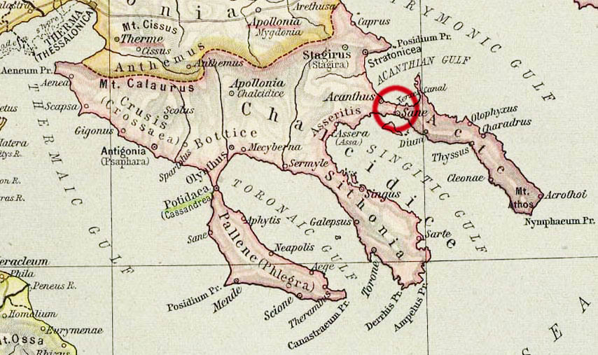 Lage des Xerxes-Kanals auf der Halbinsel Chalkidiki